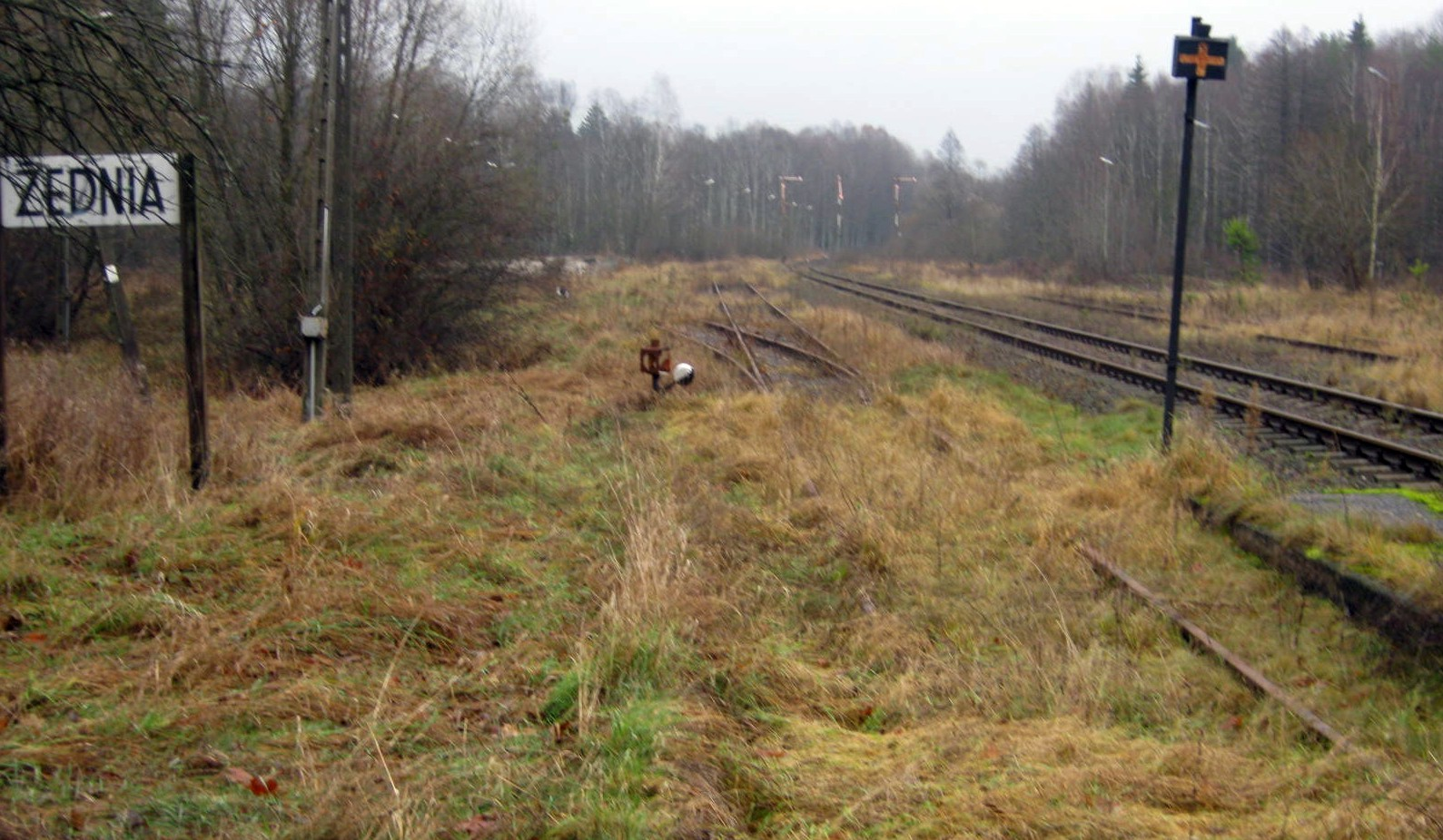 Tak wygląda stacja kolejowa w Żedni po 9-latach od zamknięcia w dniu 2 kwietnia 2000 roku linii kolejowej PKP Białystok - Zubki Białostockie.